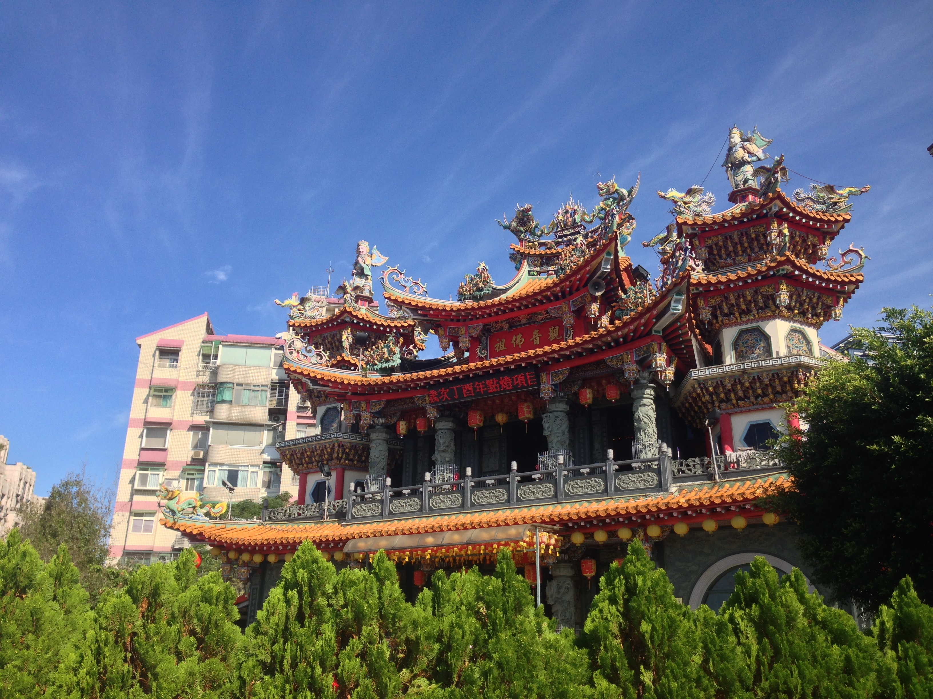 下塔悠福德宮